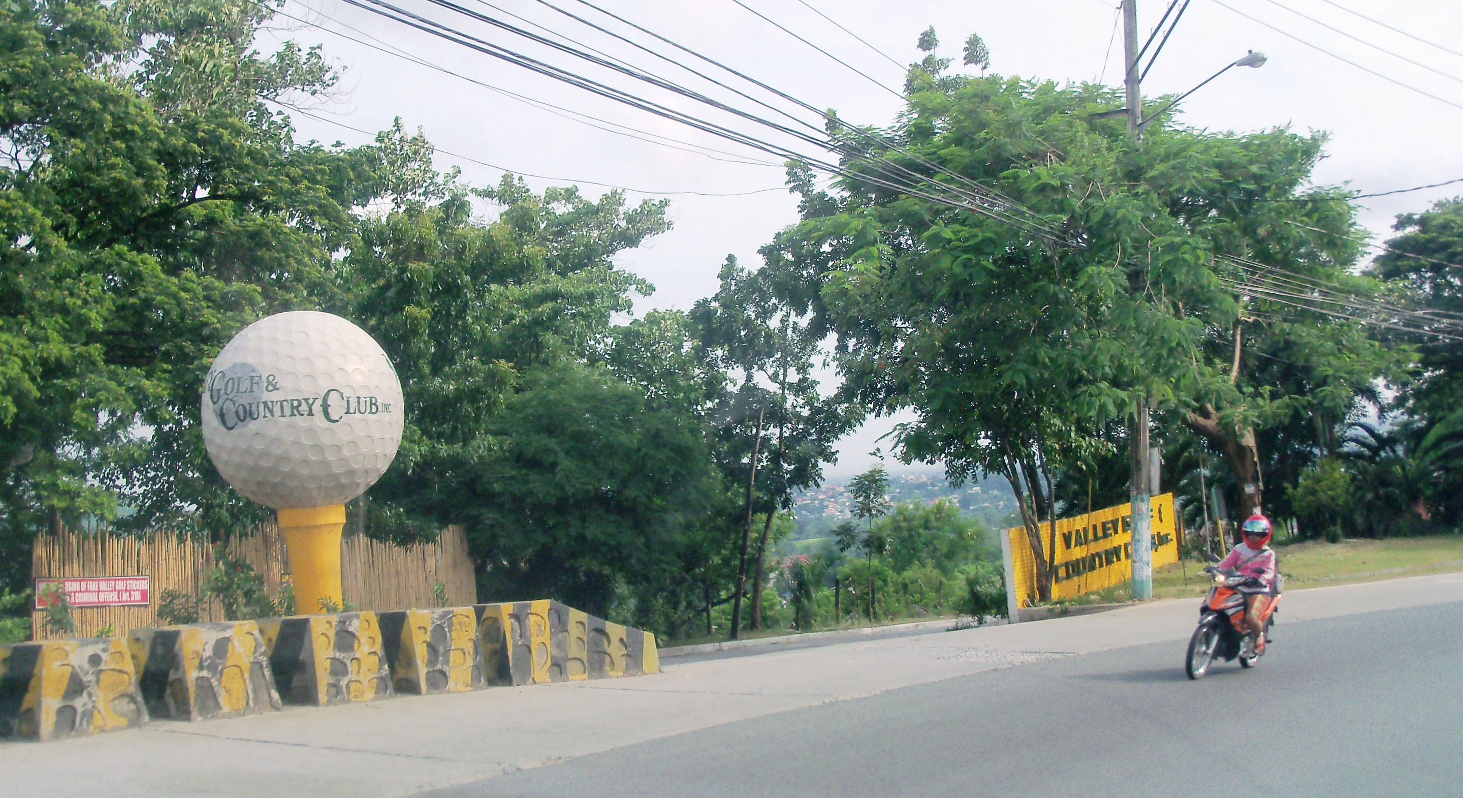 Mambugan, Antipolo, Rizal, Philippines